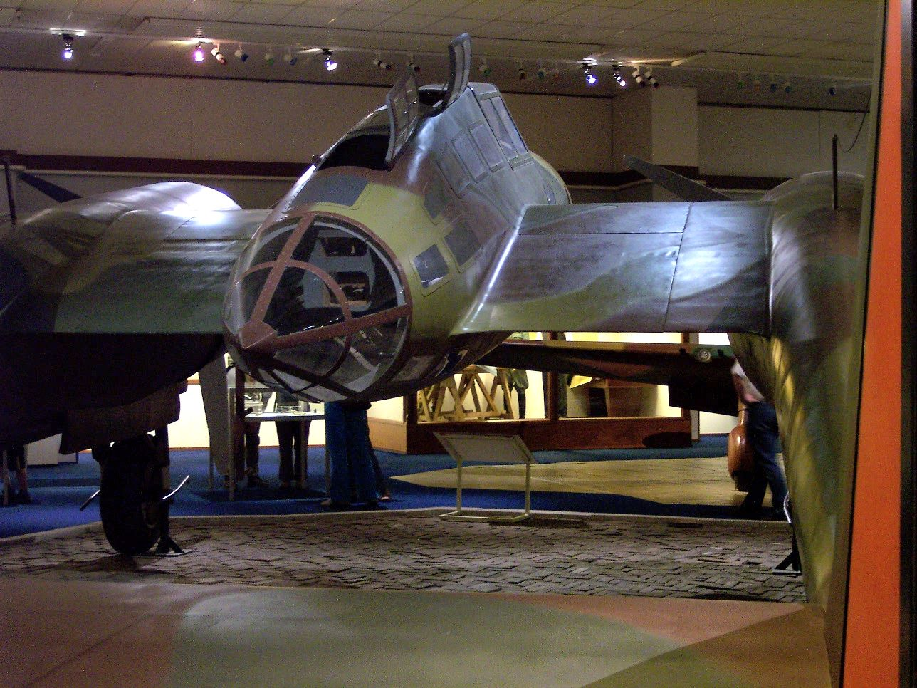 Fokker G.1A Replica in Soesterberg